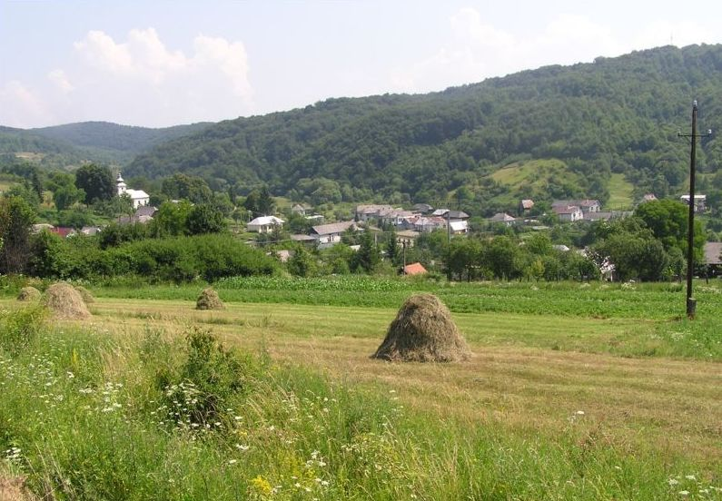 Celkový pohľad